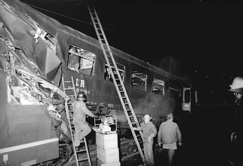 ADN-ZB Grubitzsch-29.2.1984-frs-Halle: Schweres Zugunglück-Ein folgenschweres Zugunglück ereignete sich auf dem Bahnhof Hohenthurm in der Nähe von Halle. Bei dichtem Nebel fuhr der D354 Berlin-Saarbrücken auf einen haltenden Personenzug auf, an dem eine Lokomotive gekoppelt war. Dabei kamen nach bisher vorliegenden Informationen der Lokführer sowie zwei Reisende des Personenzuges ums Leben, 43 Personen erlitten Verletzungen. - weiteres siehe ADN-Meldg.